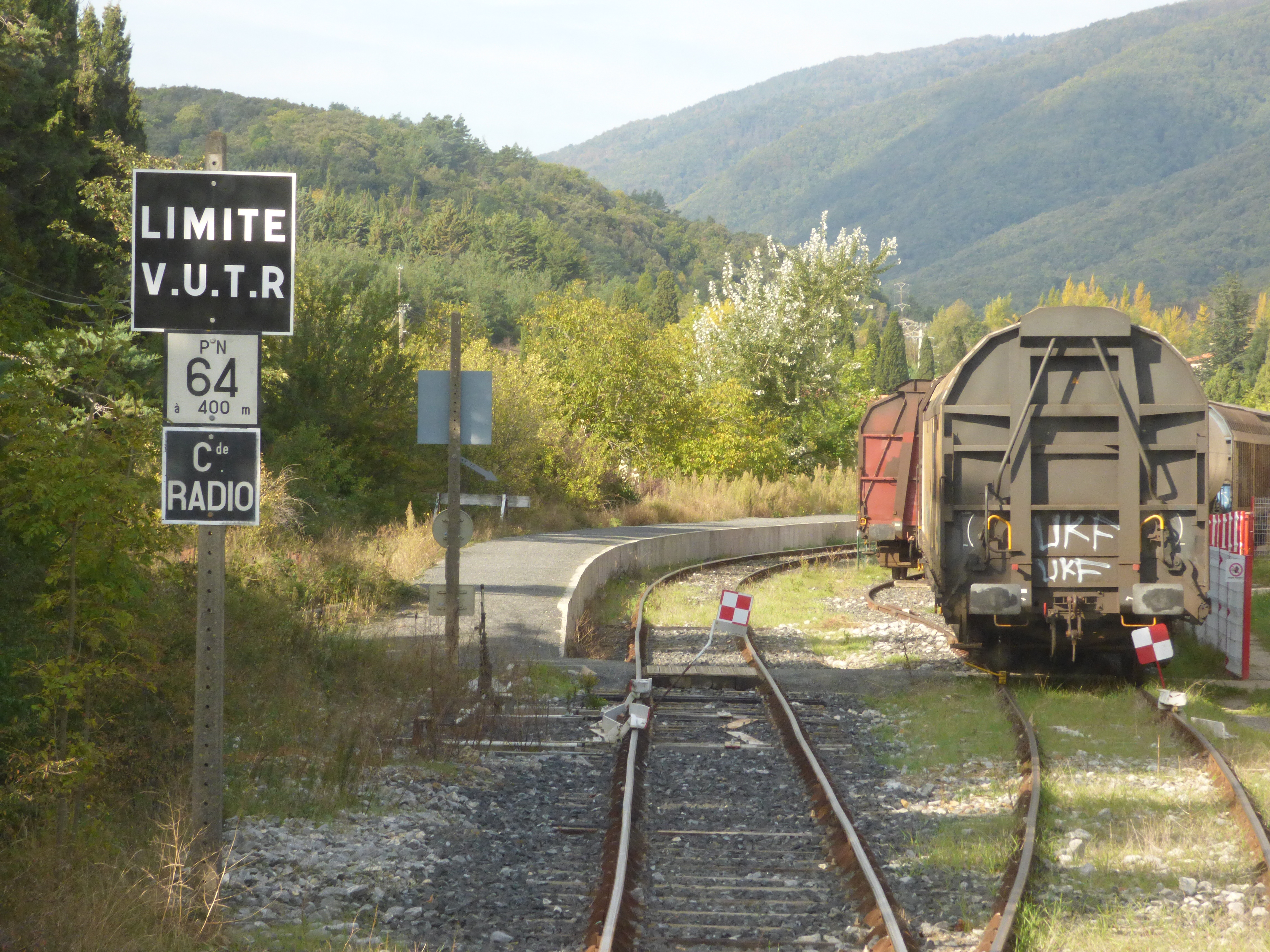 Fin de voie unique à trafic restreint sur la ligne Rivesaltes-Carcassonne